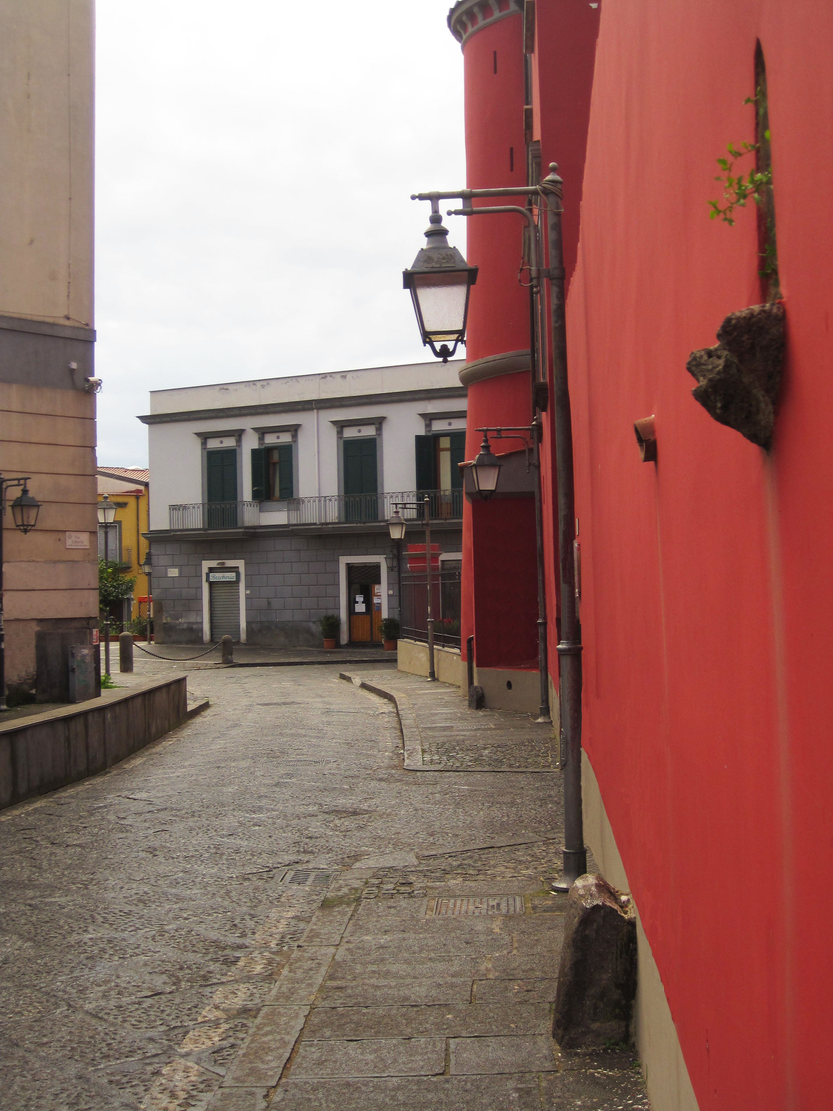 Foto scattata da me, nel mio paese Pomigliano D'Arco.